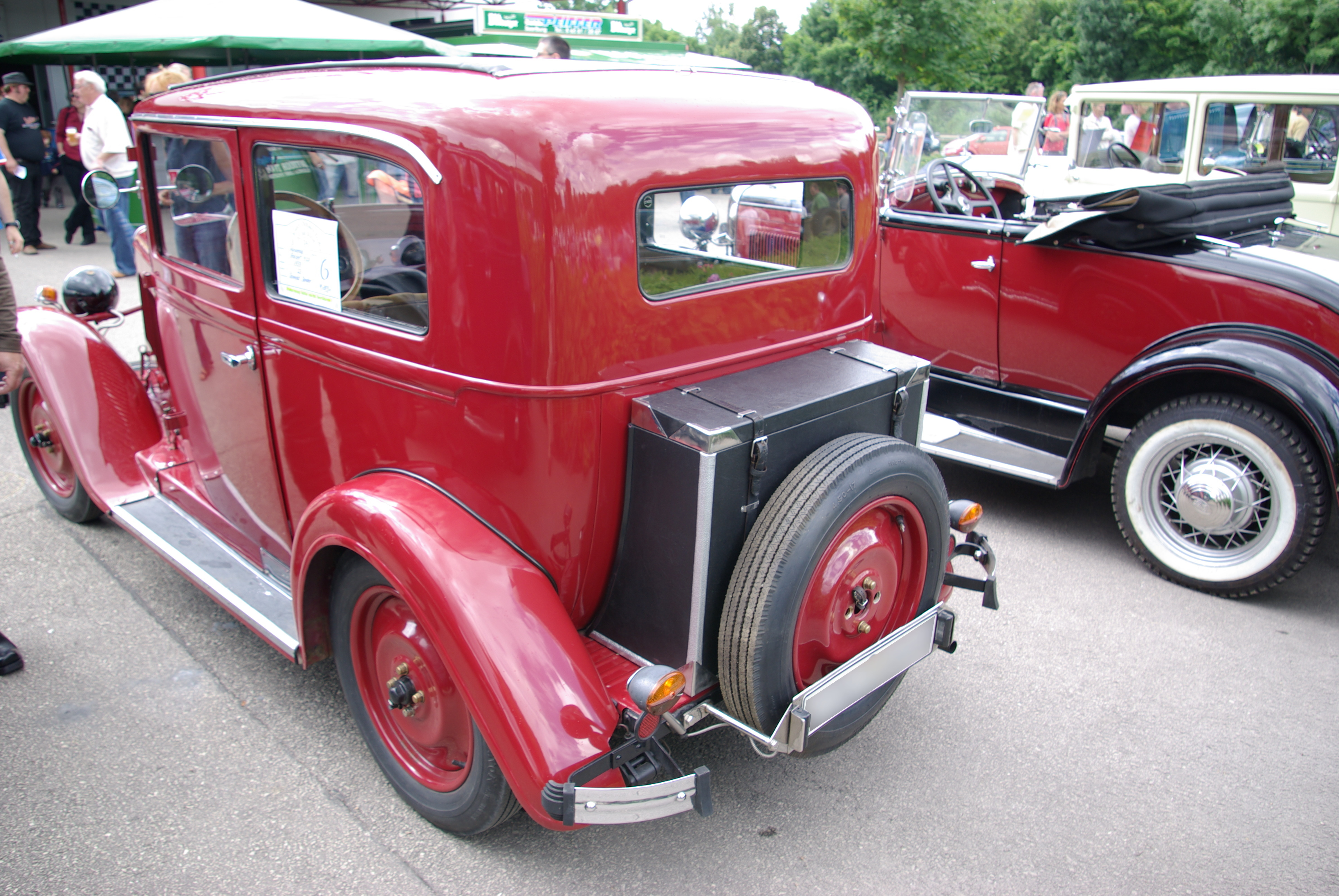 Hanomag 4/23